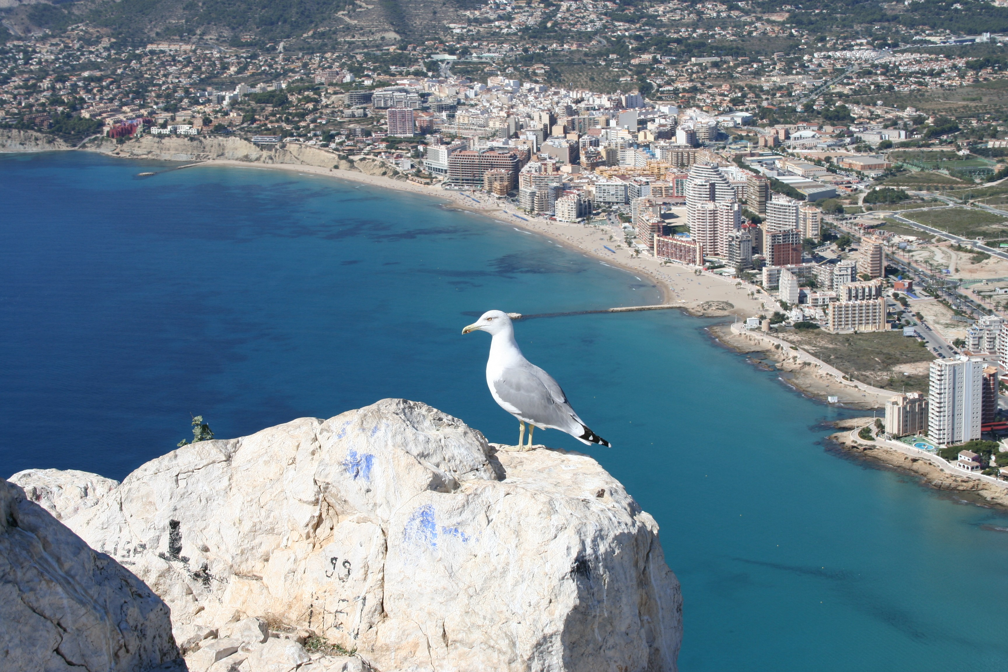 Vista de Calpe desde la cima del Peñón de Ifac